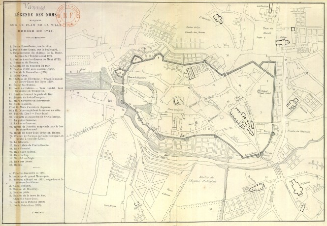 Plan de la ville de Vannes XVIIIème siècle